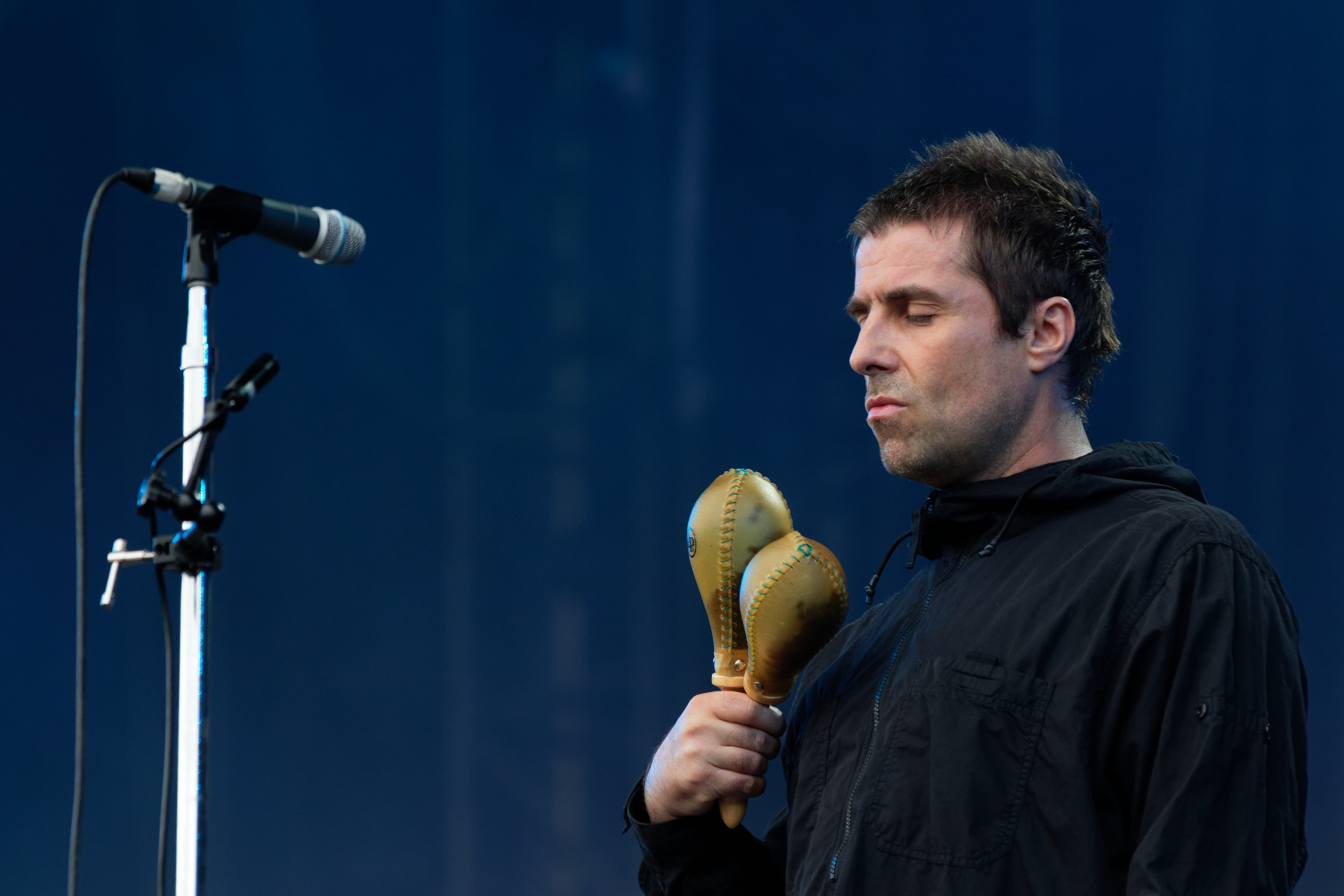 Liam Gallagher en concert lors du festival des vieilles charrues 2018.